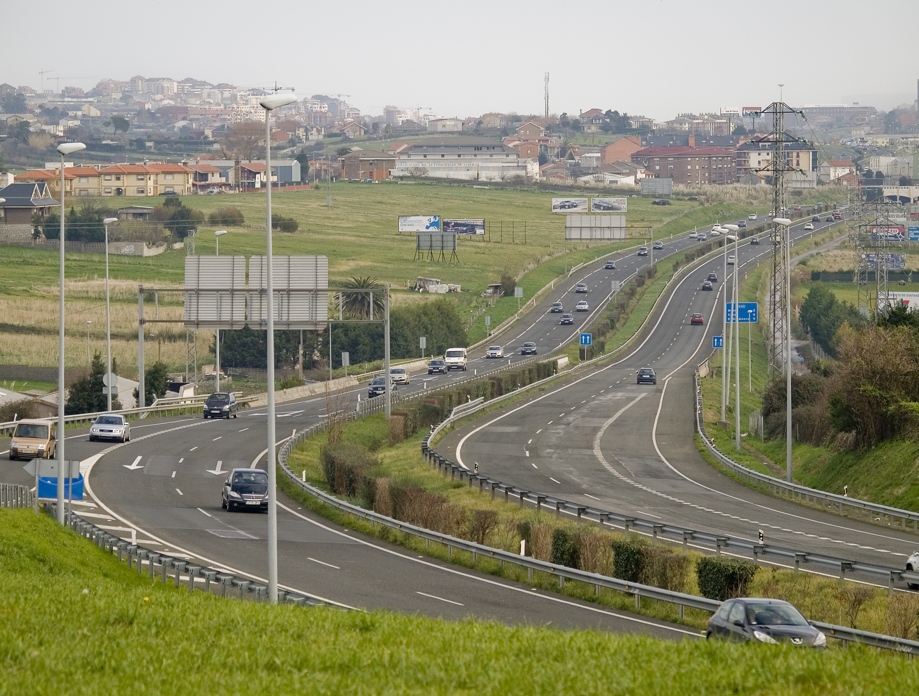 Autovía S-20 a su paso por La Albericia.